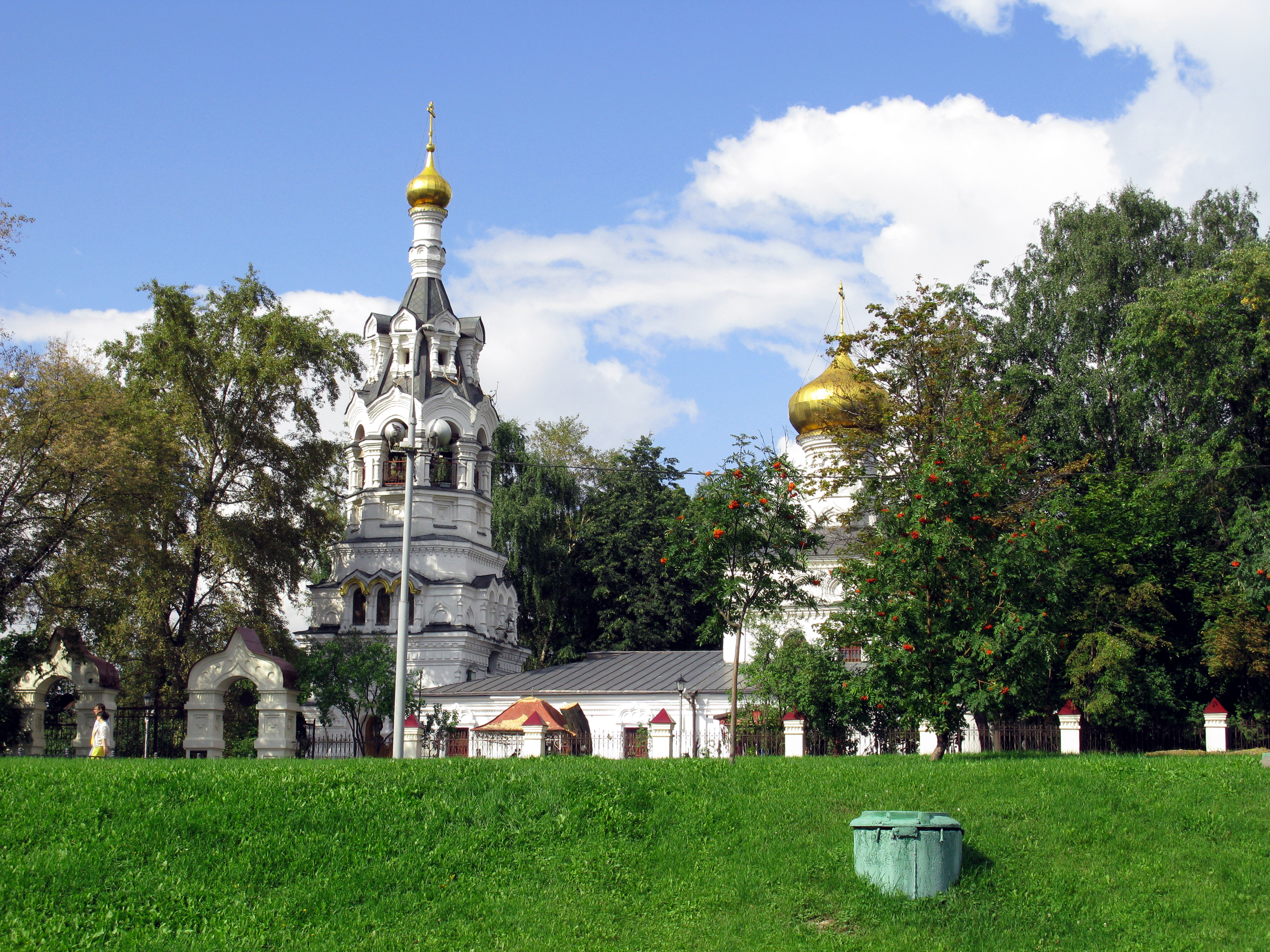 Церковь Ильи Пророка (Воздвижения Креста Господня) в Черкизове